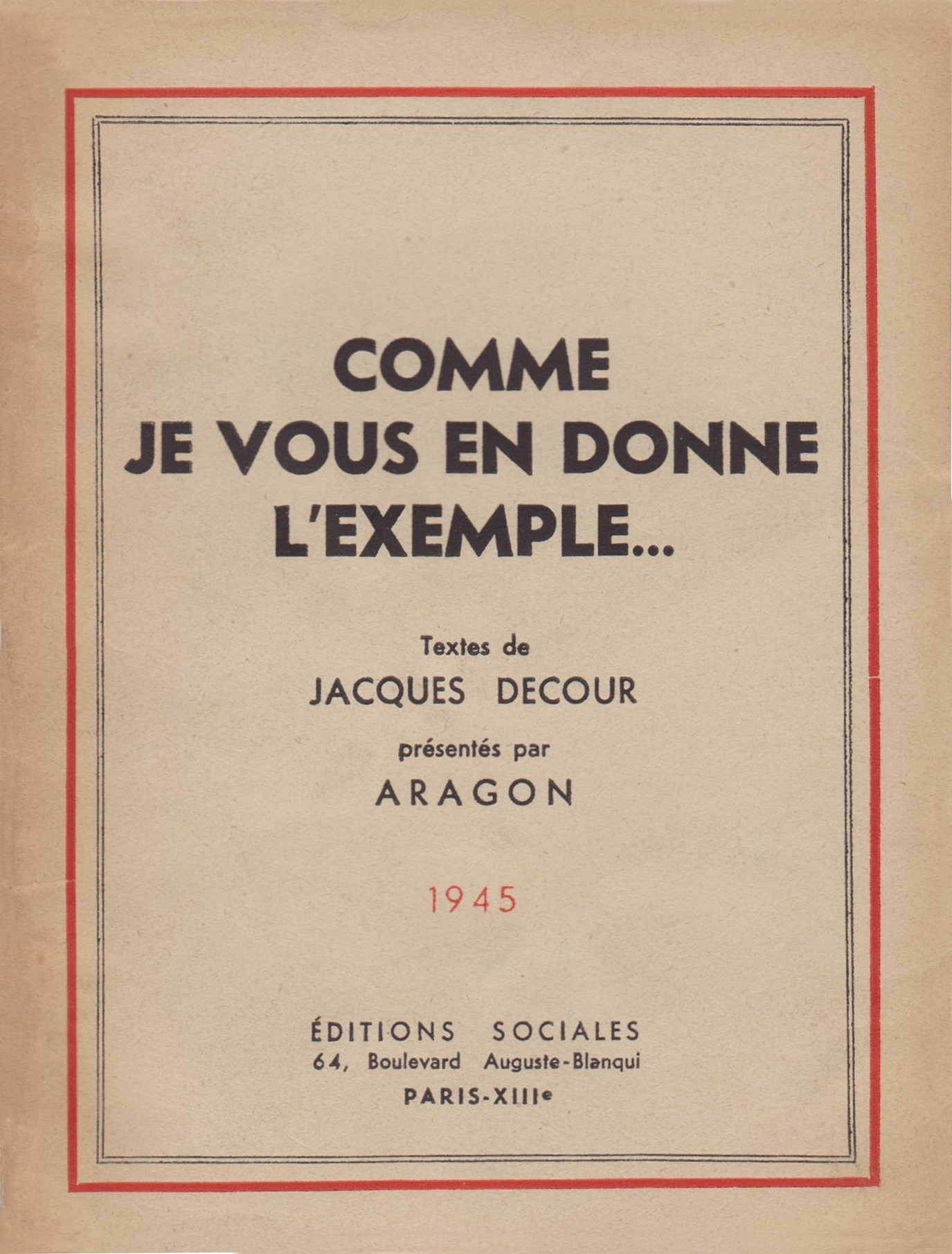 Brochure au format 15,5 cm x 12 cm, éditée en 1945 par les éditions sociales à Paris. 48 pages. Préface de Louis Aragon. Extraits d'œuvres de Jacques Decour : Le centenaire de la Chartreuse de Parme, L'humanisme allemand, Note écrite au moment de la Conférence de Munich, Sa dernière lettre. Suit une bibliographie